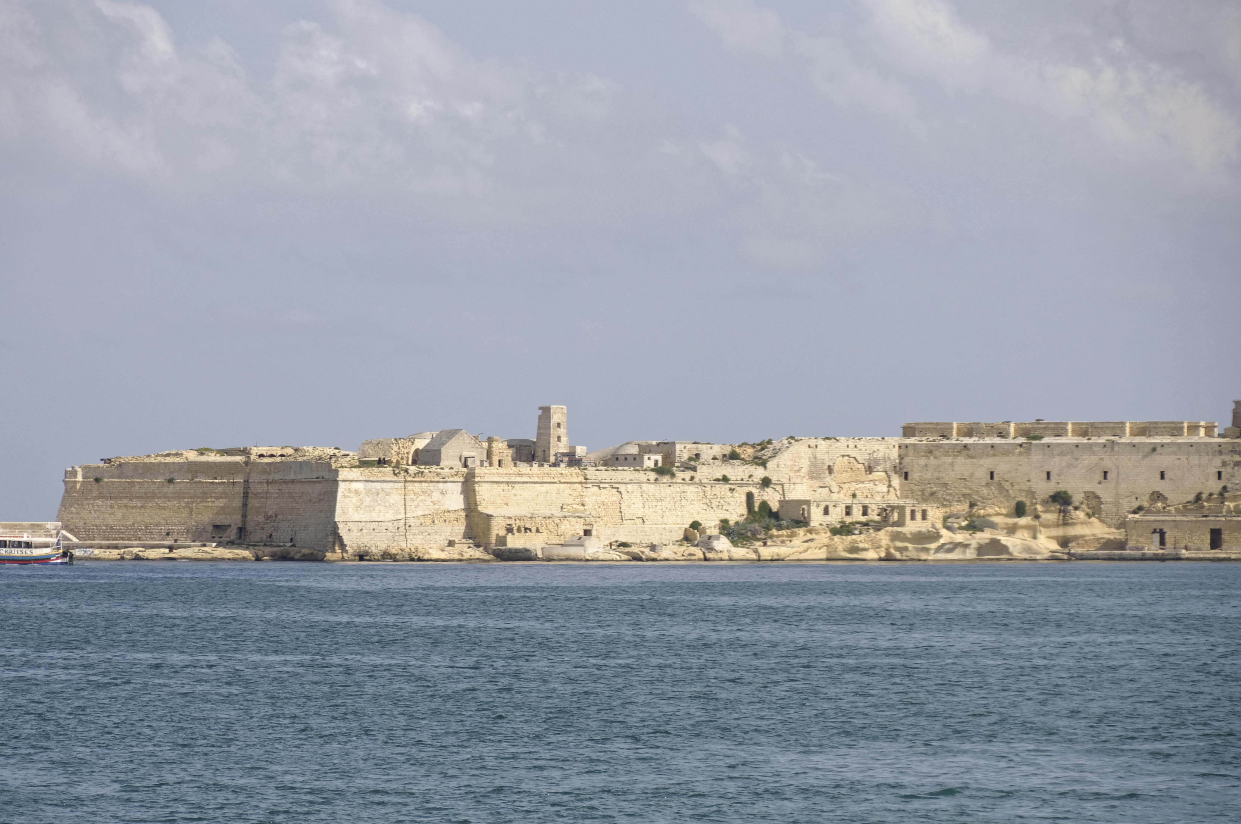 Malta-mix- 2019